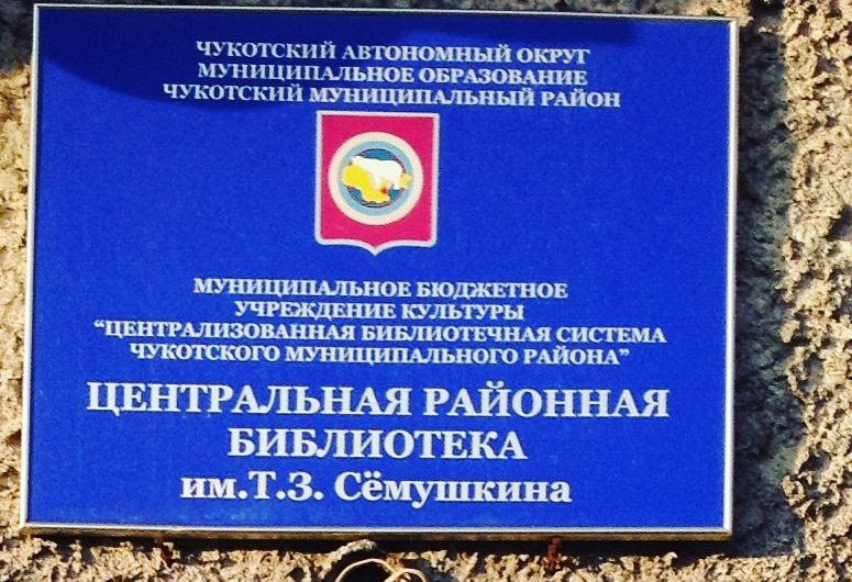 Библиотека им. Т. З. Семушкина в с. Лаврентия